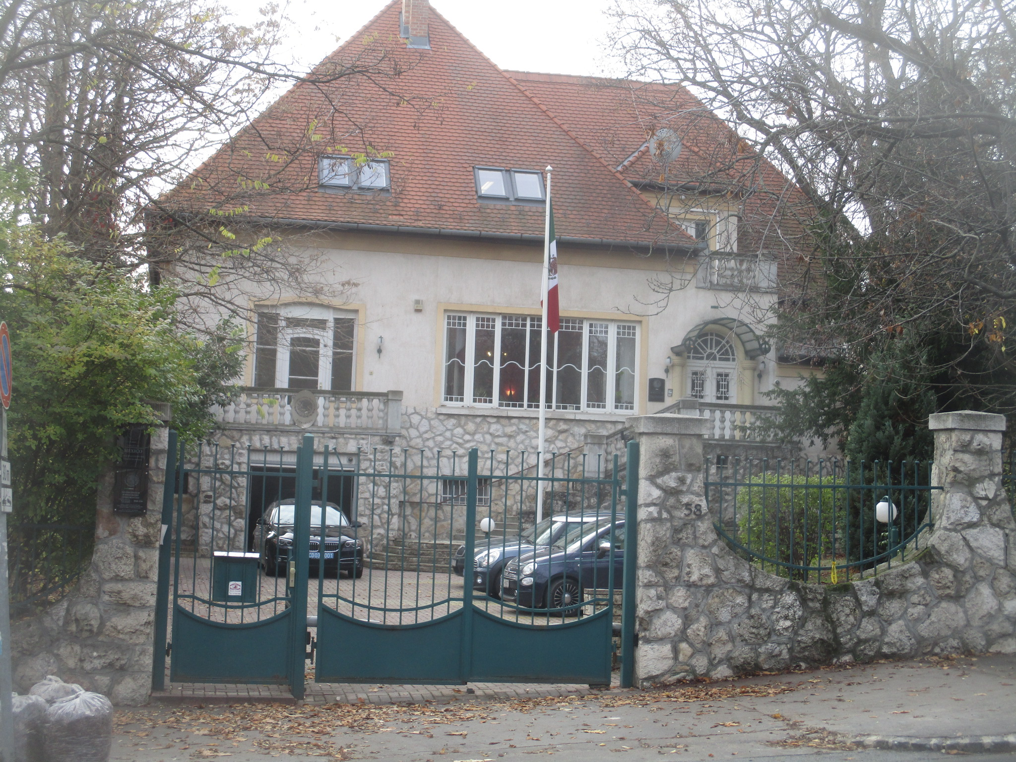 Mexikó budapesti nagykövetsége II. Rómer Flóris u. 58